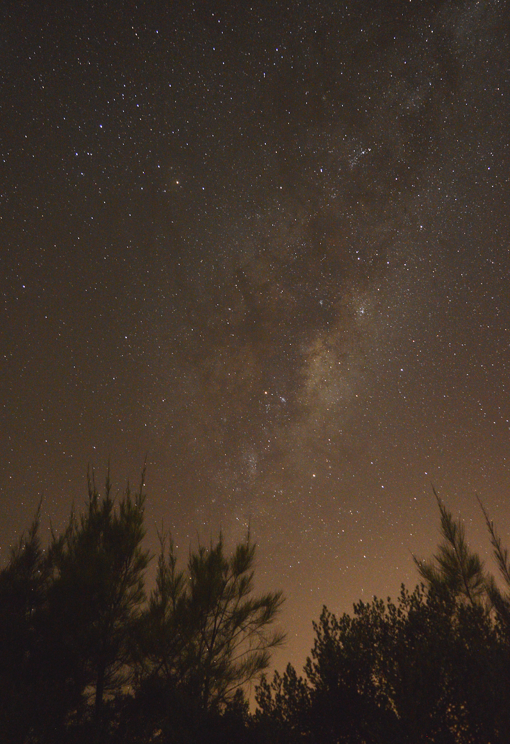 Via Lactea desde Balcarce, Argentina. Capturada por Esteban J. Andrada